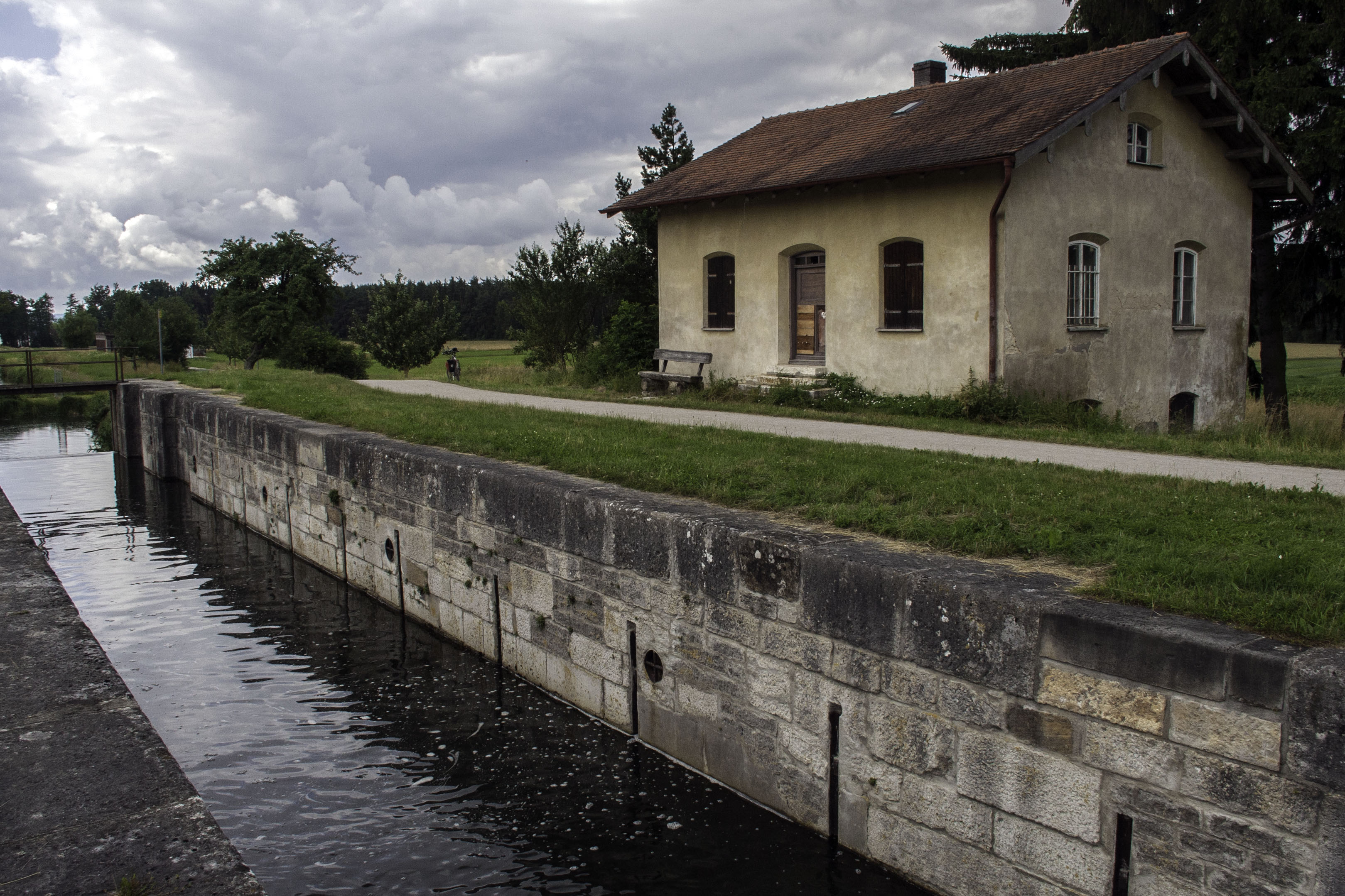 Schleuse 29, Ludwig-Donau-Main-Kanal